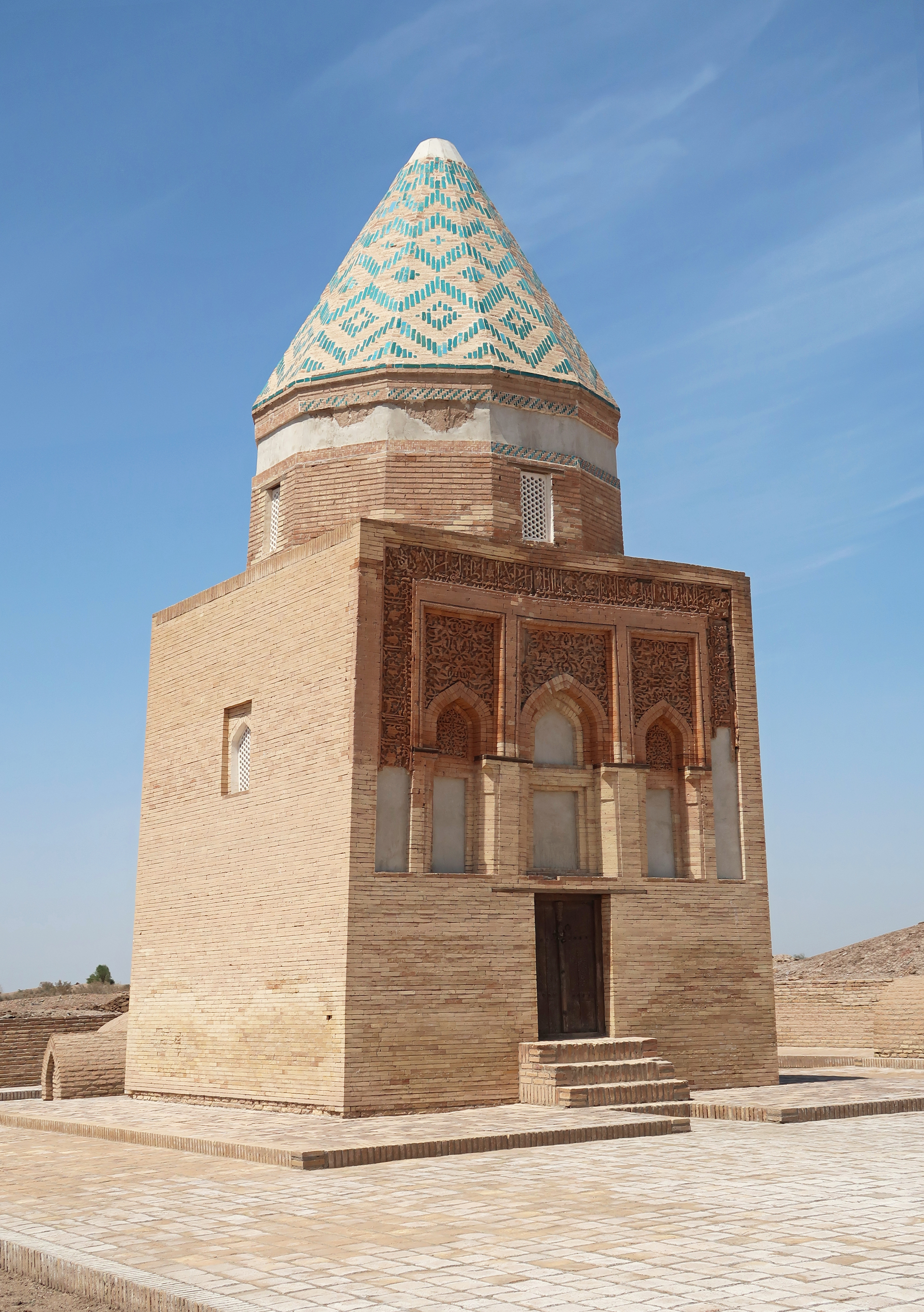 Konye-Urgench, Turkmenistan